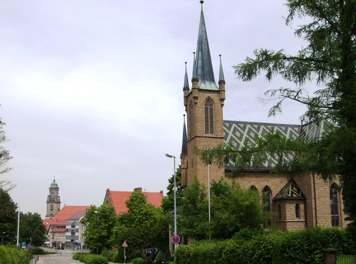 Hechingen